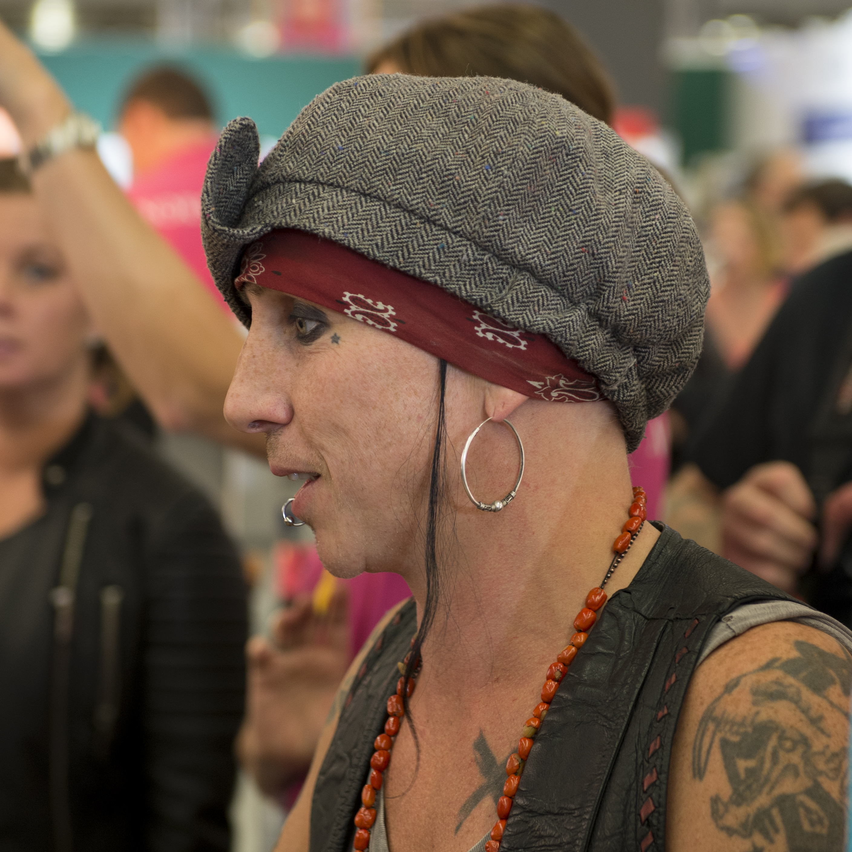 "Dregen" på Bokmässan 2013.